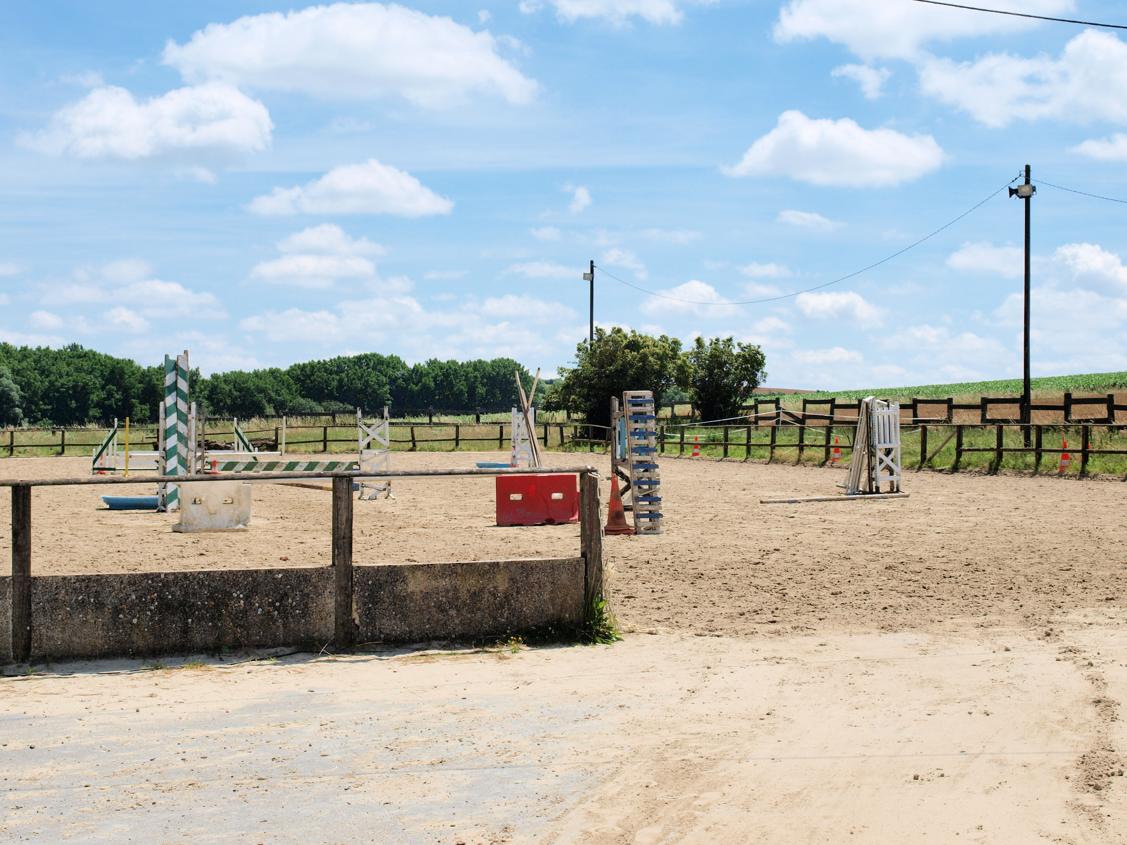 Cense de Remicourt à Rethel (Ardennes, France)